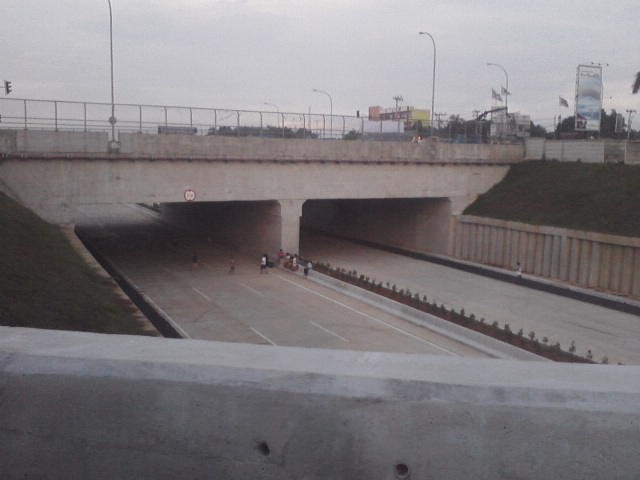 Tol Cijago tahap 2 Segera Dioperasikan pada Gerbang Tol Cisalak 3 terdahulu. Supaya untuk yang Pemakai Jalan dari Bogor & Jl. Juanda Depok, akan Melintasi secara langsung.